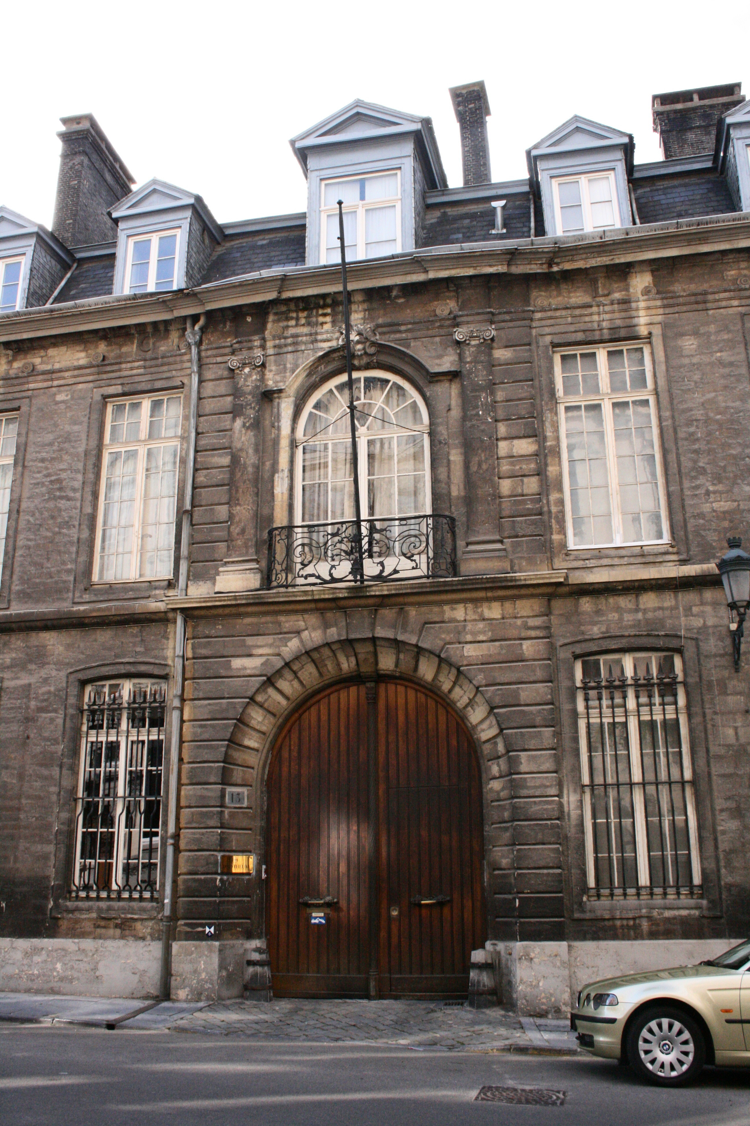 13 rue aux Laines, Bruxelles (Belgique). Hôtel de Lannoy